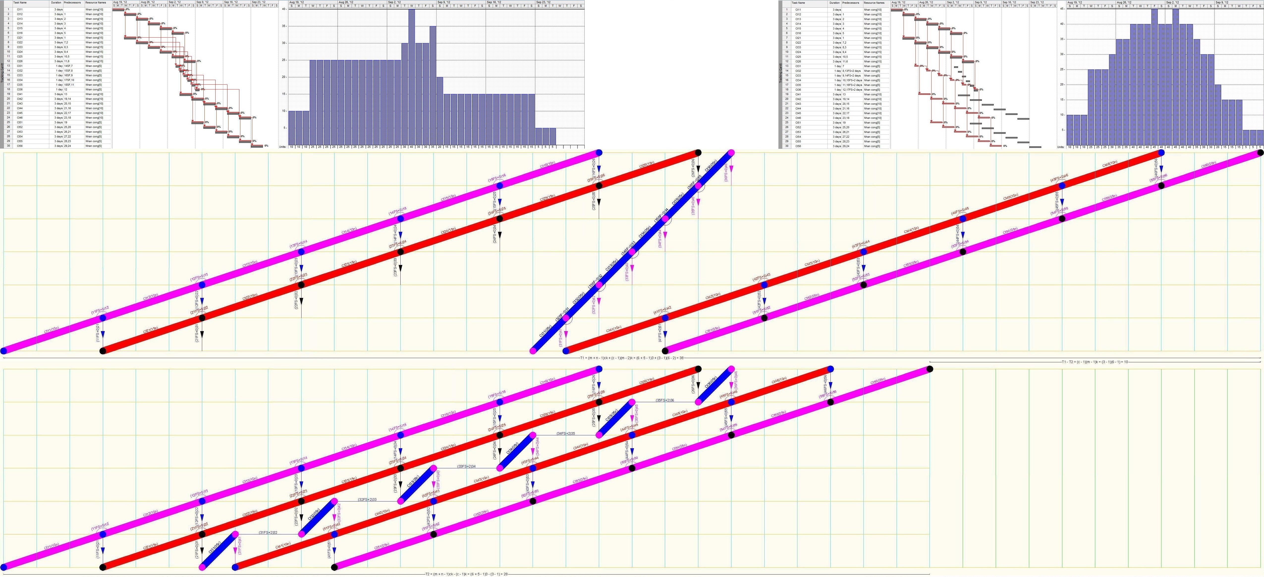 Hình vẽ mô tả việc biến đổi dây chuyền đơn nhịp ước số (còn gọi là cân bằng dây chuyền nhịp nhàng theo nhịp nhanh), trong tiến độ dây chuyền nhịp bội lẻ một dây chuyền nhịp ước (nhịp nhanh), thành tổ đội chuyên nghiệp (không còn là dây chuyên đơn) hoạt động với mô đun chu kỳ bằng với nhịp của các dây chuyền nhịp bội nhịp nhàng còn lại (các nhịp chậm). Nhằm làm giảm tối đa thời lượng thực hiện toàn bộ dự án. Hình hoàn toàn do tôi sáng tạo ra, qua việc vẽ trên AutoCAD 2010, chụp ảnh màn hình, và sửa đổi trên ACD FotoCanvas 3.0 cùng Paint.